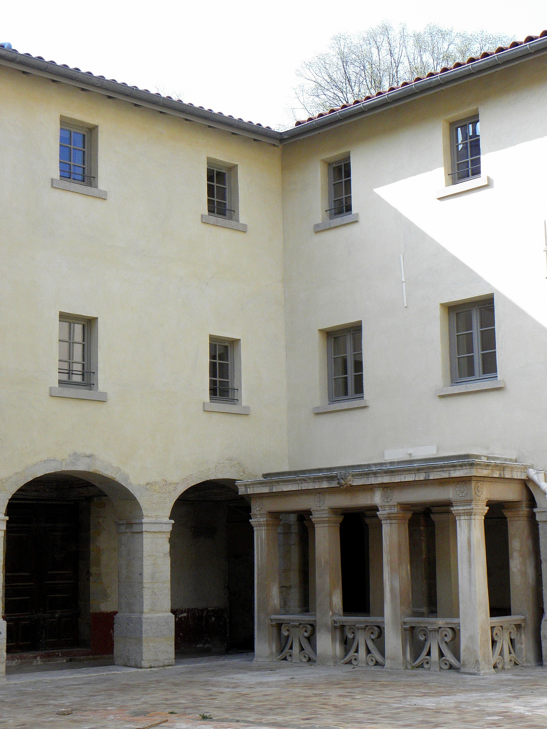 Cloître de l'Antiquaille et accès au cachot de Saint-Pothin.